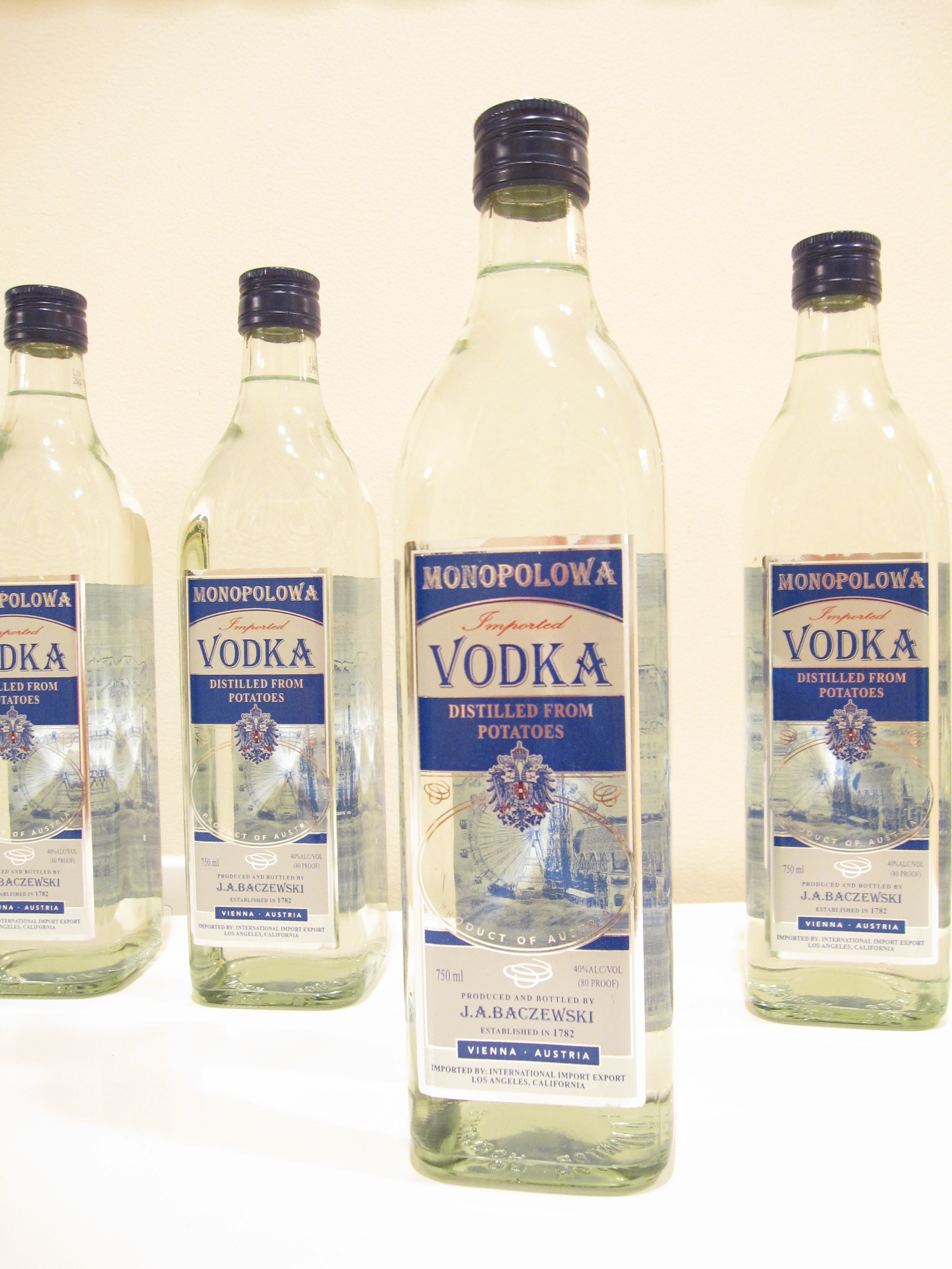 Monopolowa vodka